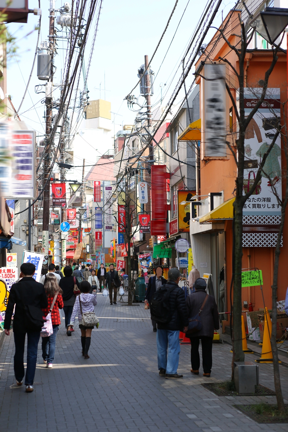 浦和区裏門通り